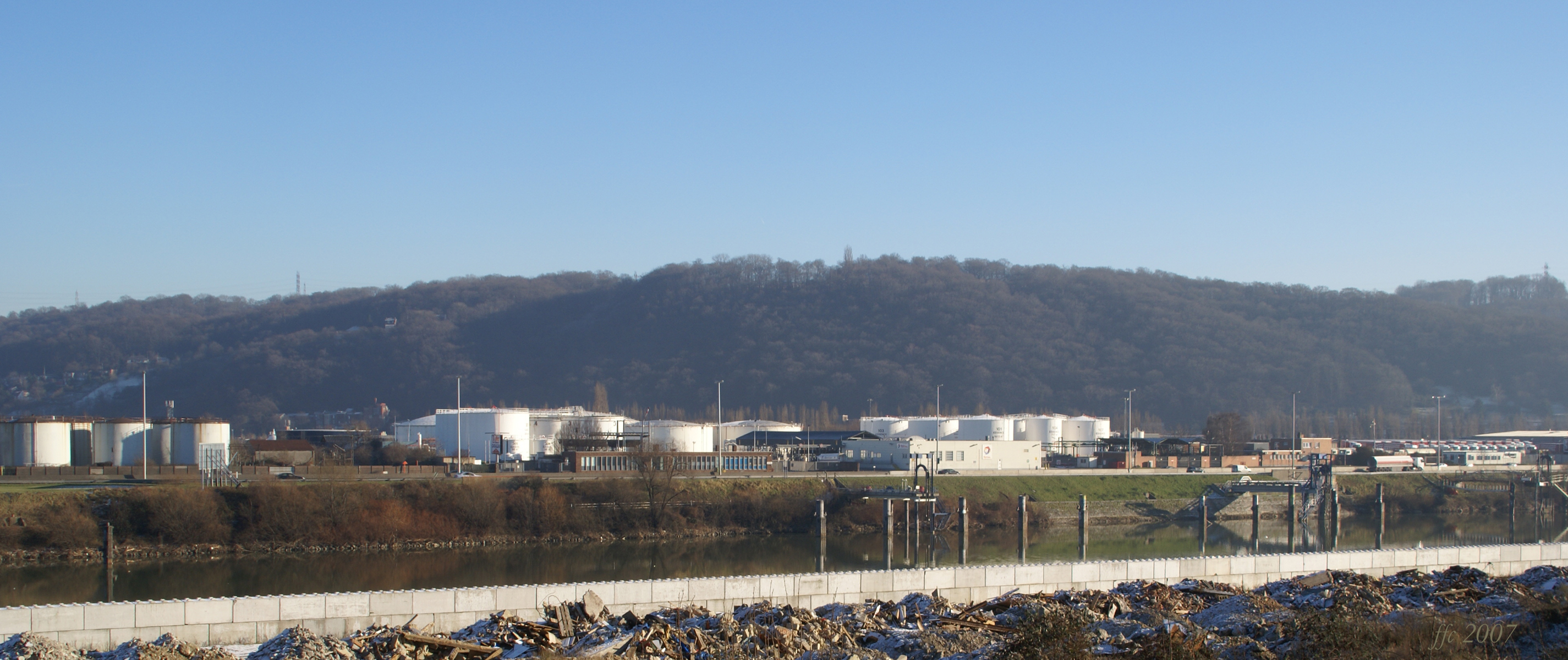 Port pétrolier de Liège